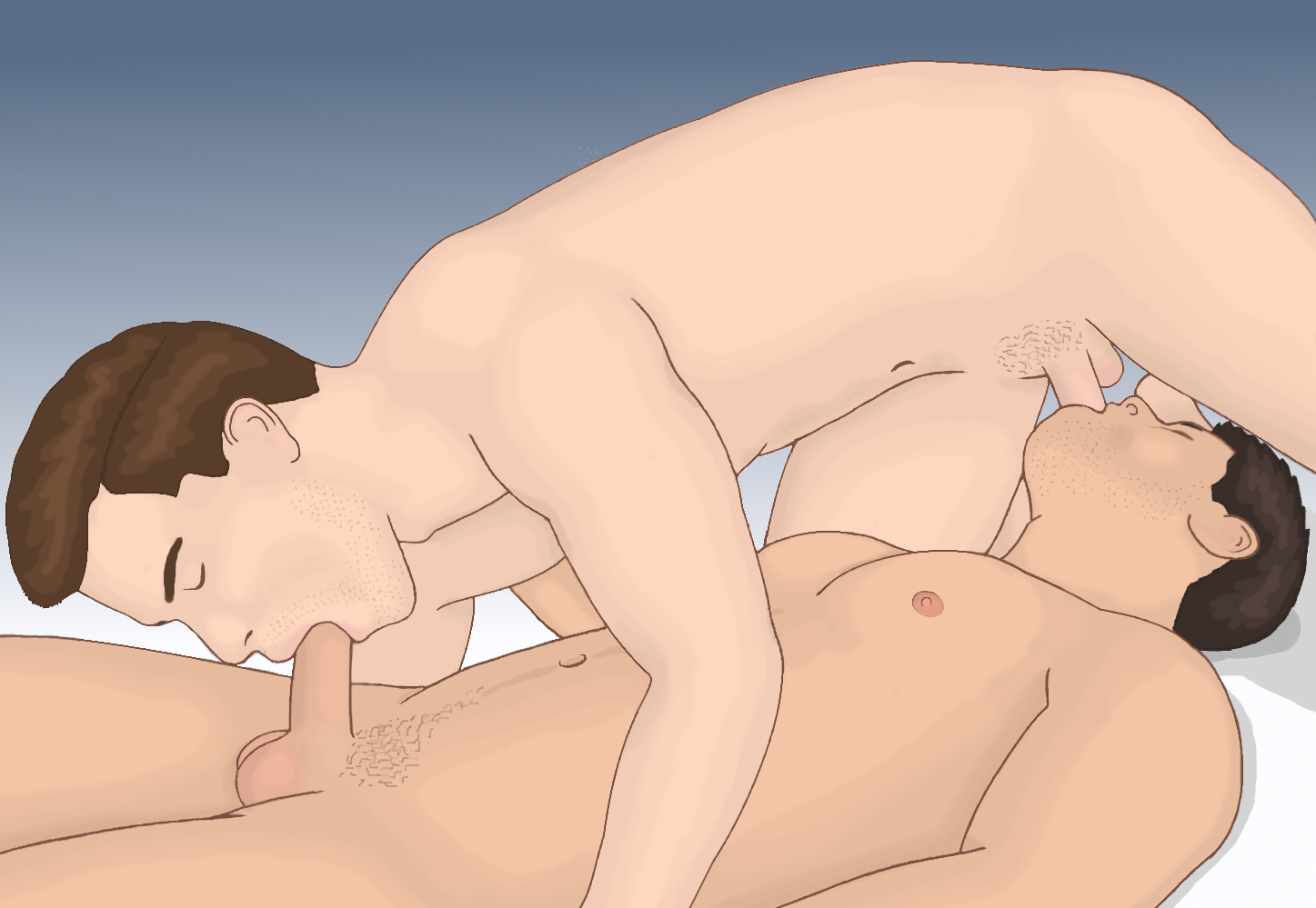 Dos hombres realizando felación mutuamente en la postura del 69.